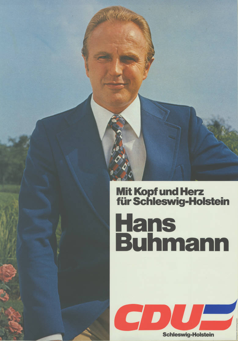 Mit Kopf und Herz für Schleswig-Holstein Hans Buhmann CDU Schleswig-Holstein Abbildung: Foto Plakatart: Kandidaten-/Personenplakat mit Porträt Auftraggeber: Verantw.: CDU Schleswig-Holstein Objekt-Signatur: 10-012 : 411 Bestand: Landtagswahlplakate Schleswig-Holstein (10-012) GliederungBestand10-18: Landtagswahlplakate Schleswig-Holstein (10-012) » Landtagswahl am 29.4.1979 » Kandidatenplakate Lizenz: KAS/ACDP 10-012 : 411 CC-BY-SA 3.0 DE